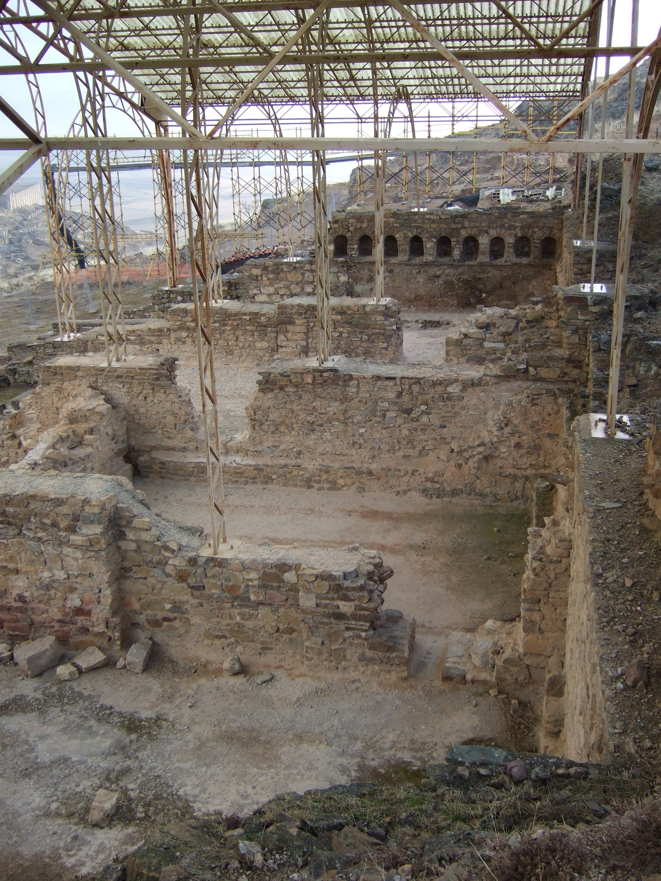 Termas de Bílbilis, abandonadas a finales del siglo II ddC